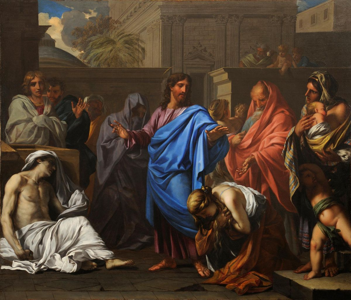 La Résurrection de Lazare